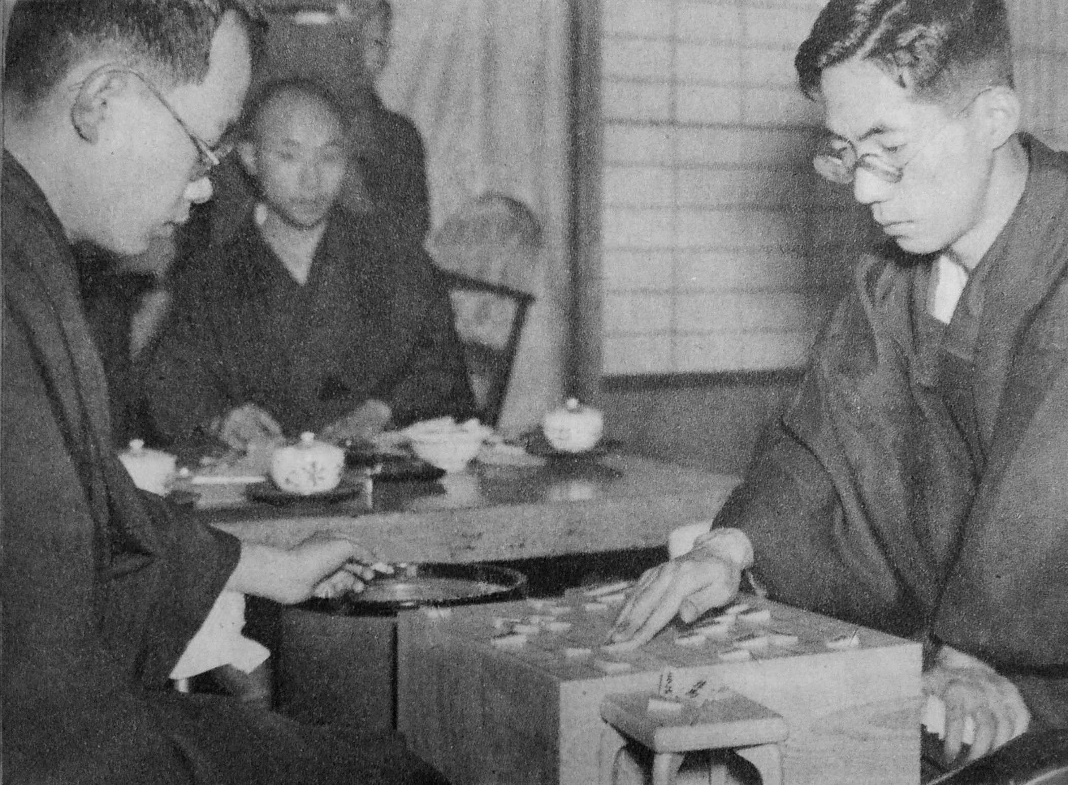 1948年度名人戦での大山康晴（左）と塚田正夫（右）